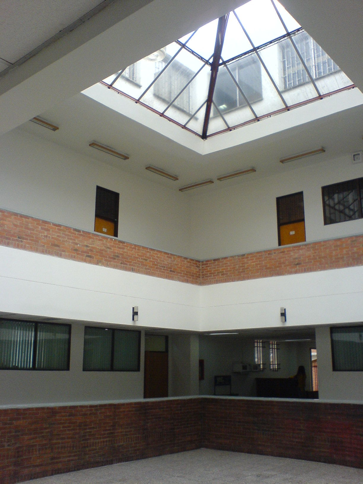 Fisica